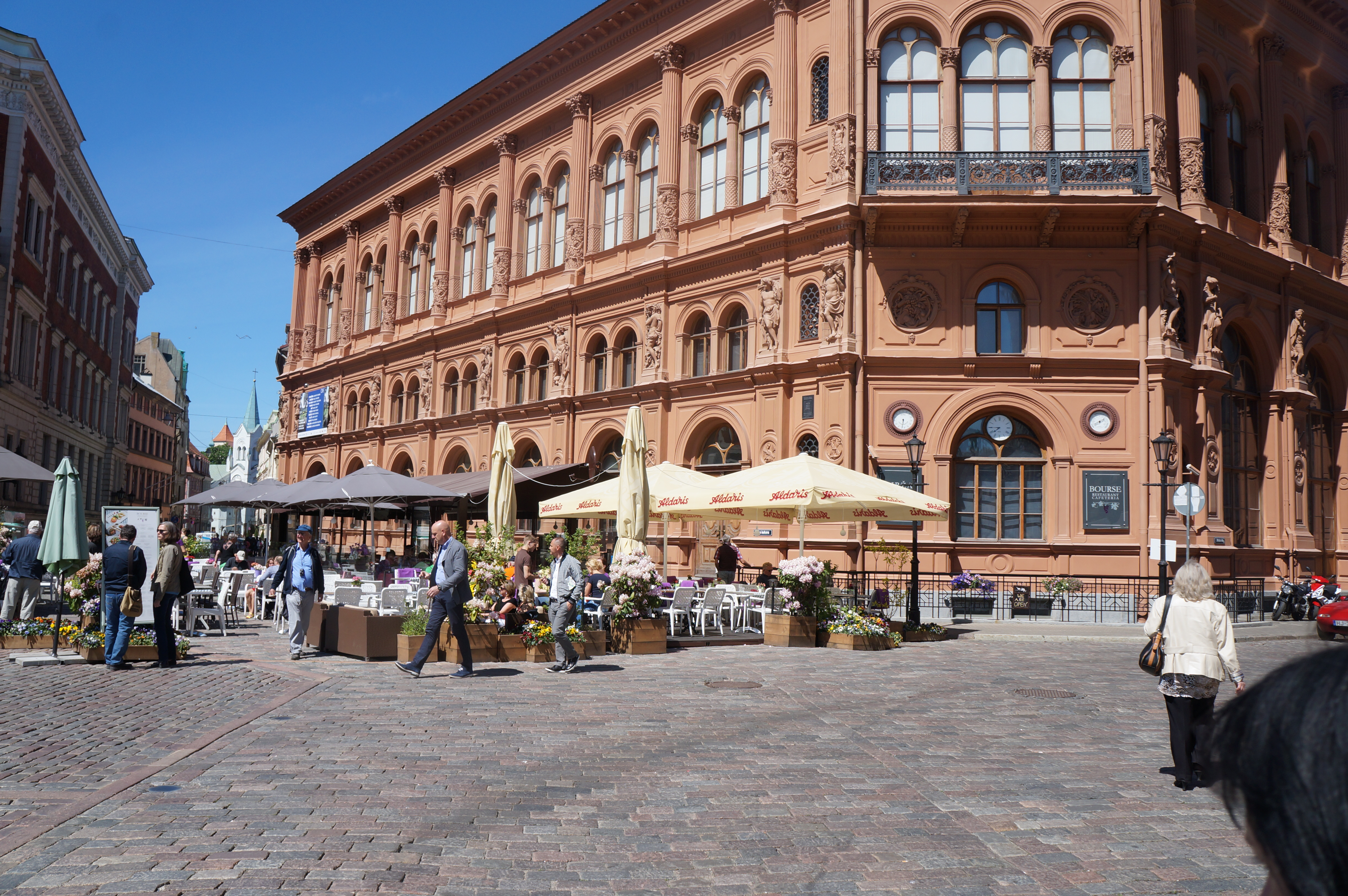 Musée d'Art Riga Bourse, Riga, Latvia Letonie.